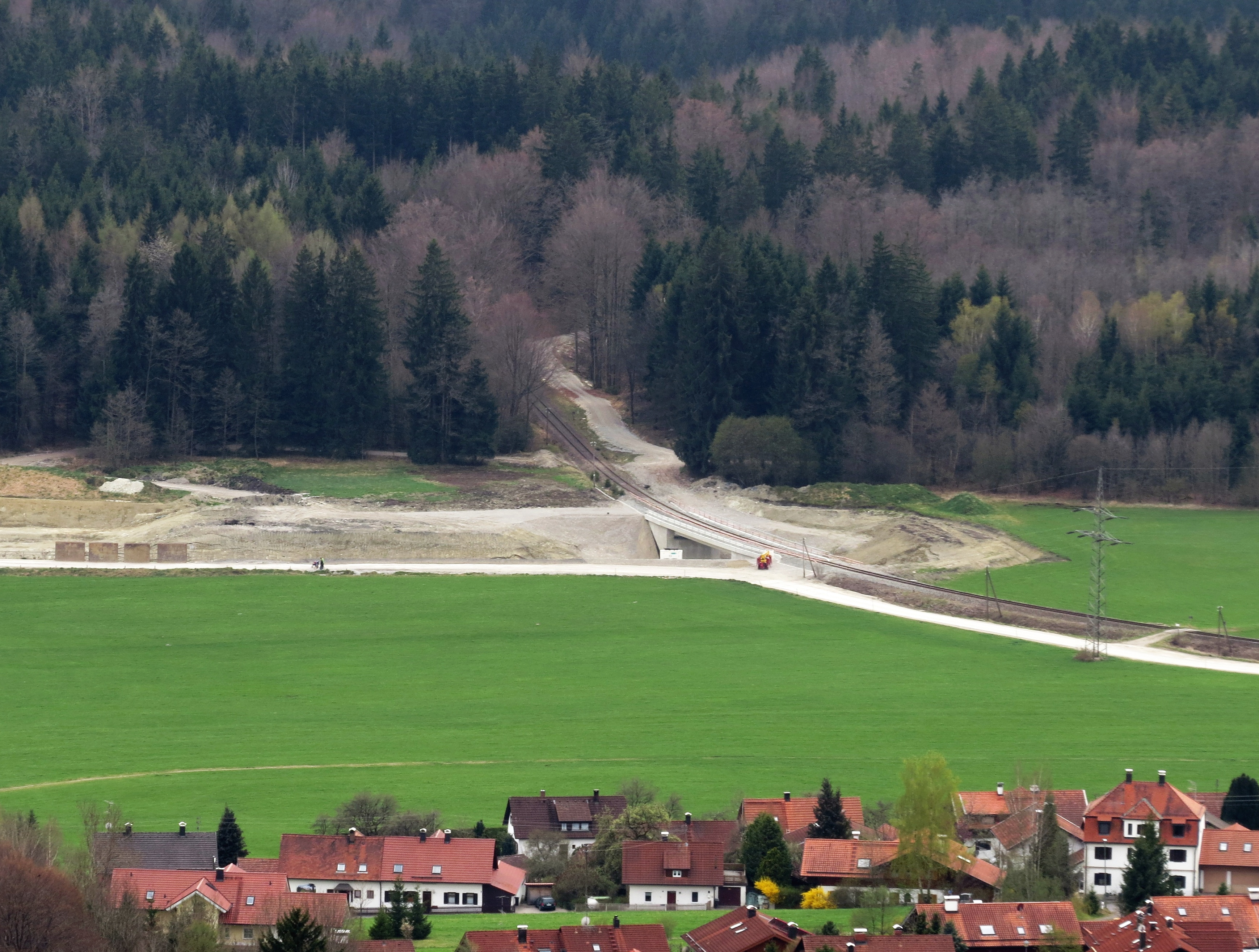 Bahnstrecke Weilheim–Schongau unmittelbar westlich des Bahnhofs Hohenpeißenberg, vom Gipfelplateau des Hohen Peißenbergs aus gesehen. In der Mitte die bereits fertiggestellte Überführung über die teilweise (zwischen Peißenberg und dieser Brücke) im Bau befindliche südliche Ortsumfahrung Hohenpeißenbergs im Zuge einer Verlegung der Bundesstraße 472 (Bauzustand April 2014).